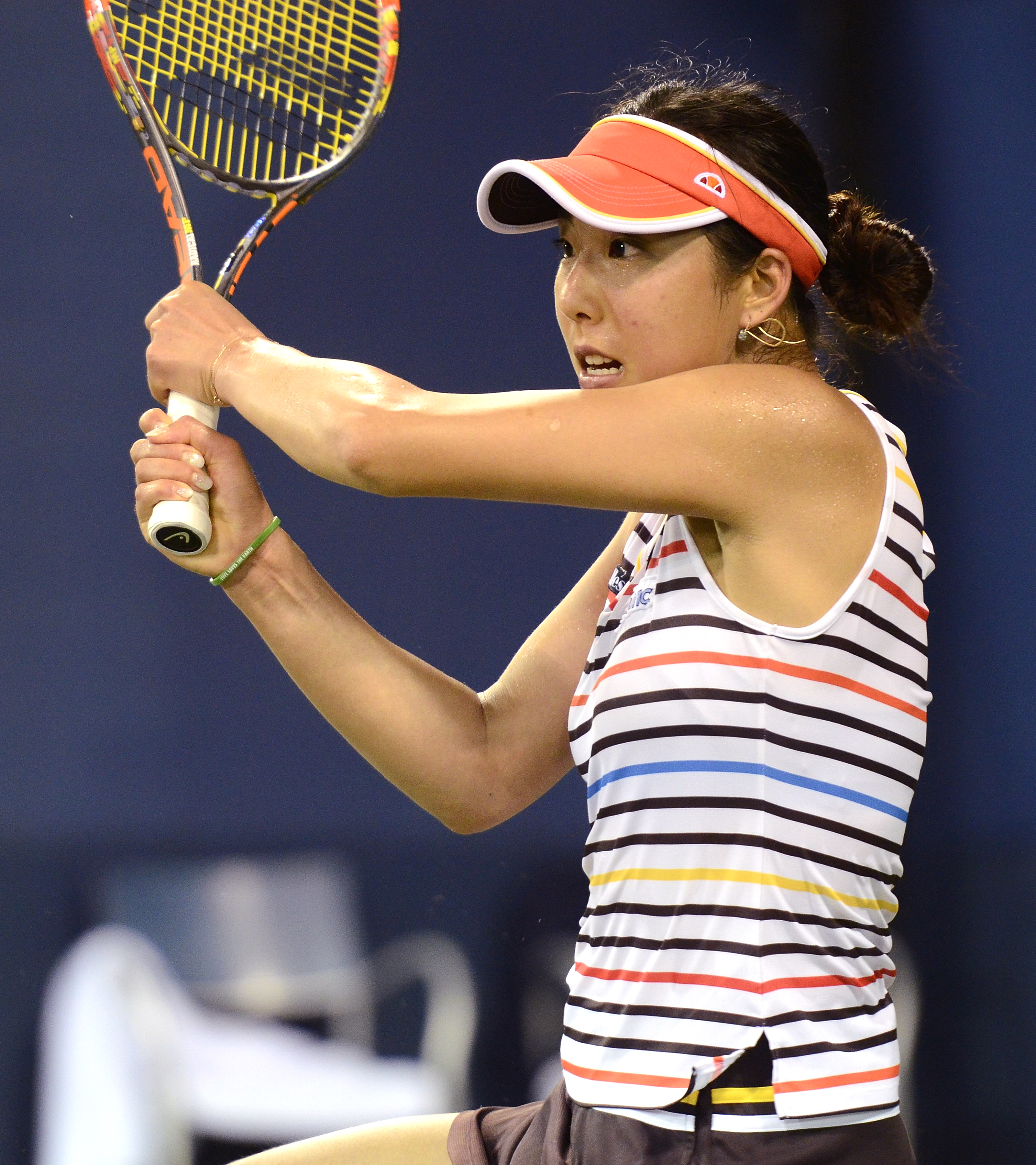 August 21, 2014 Queens, NY Misa Eguchi (JPN) def. Cagla Buyukakcay (TUR)